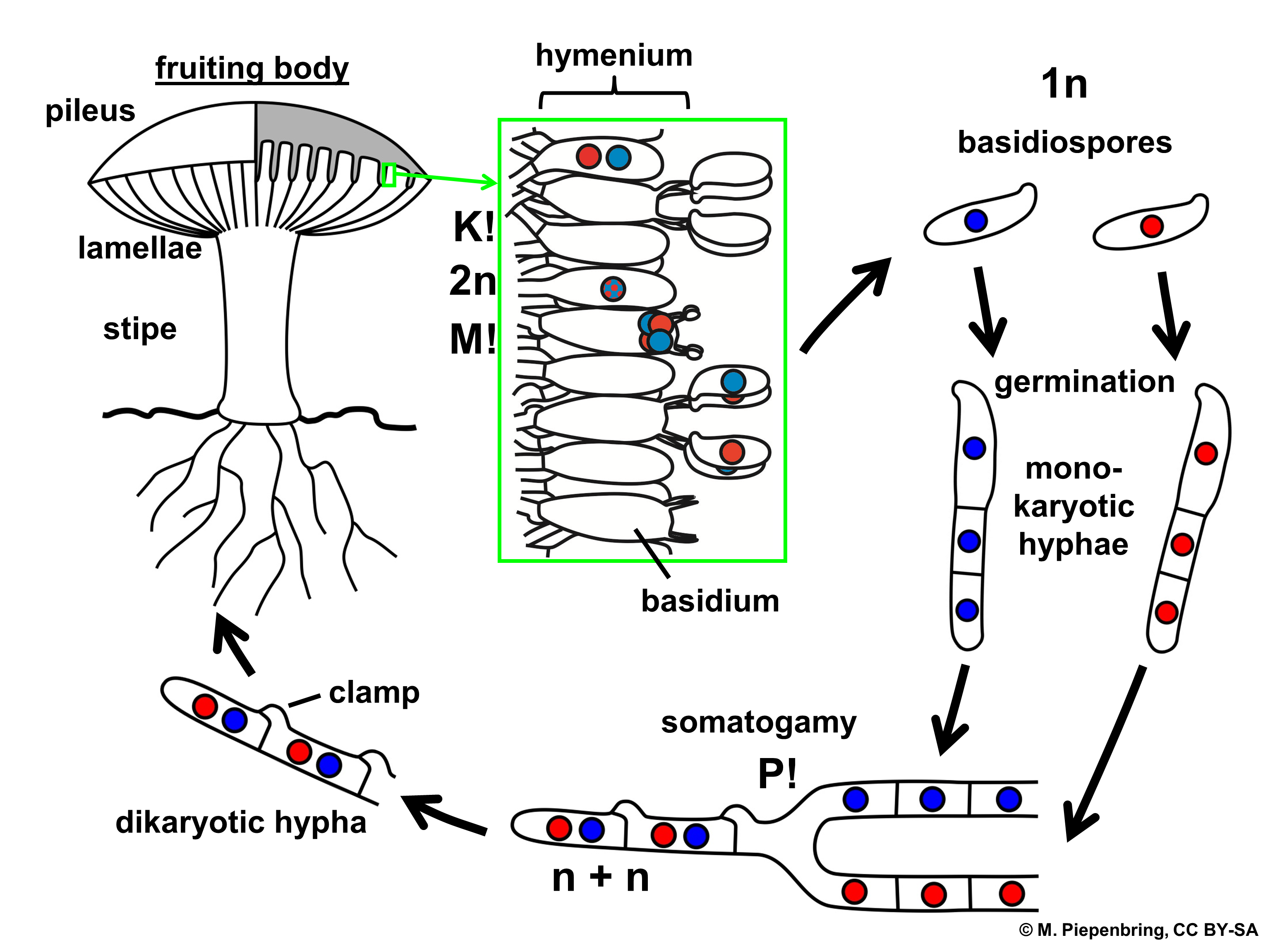 Biologische Schemata, gezeichnet und freigegeben von M. Piepenbring